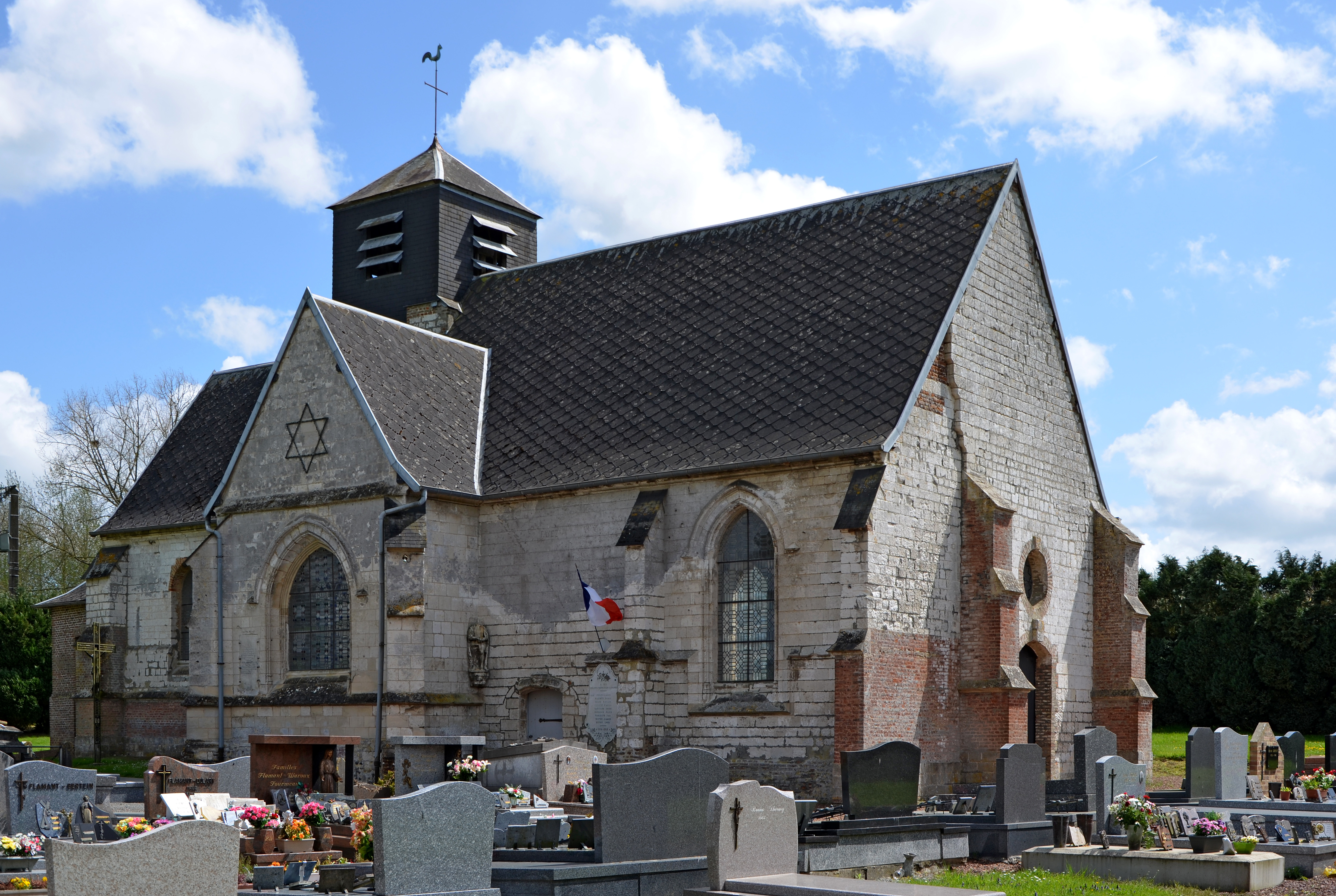 Eglise de Béalcourt, Somme, France .